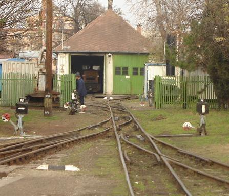 A Kecskeméti Kisvasút állomásának fűtőháza